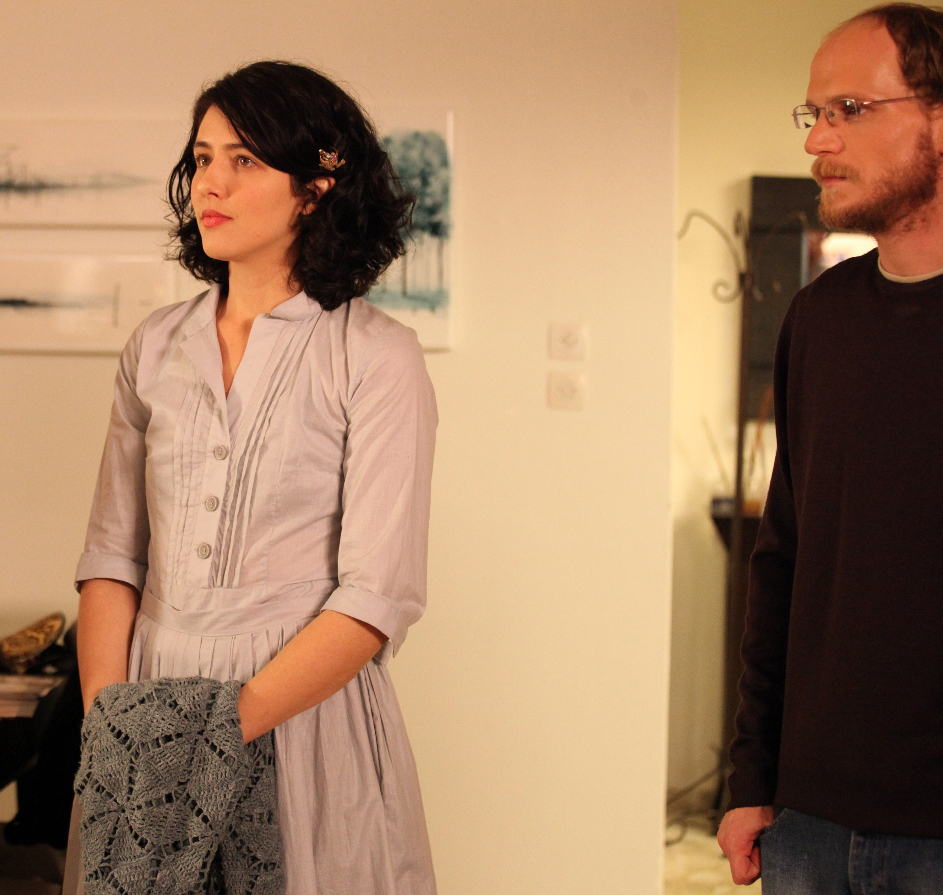 רותם קינן ושרון טל בסרטו של ערן קולירין ההתחלפות